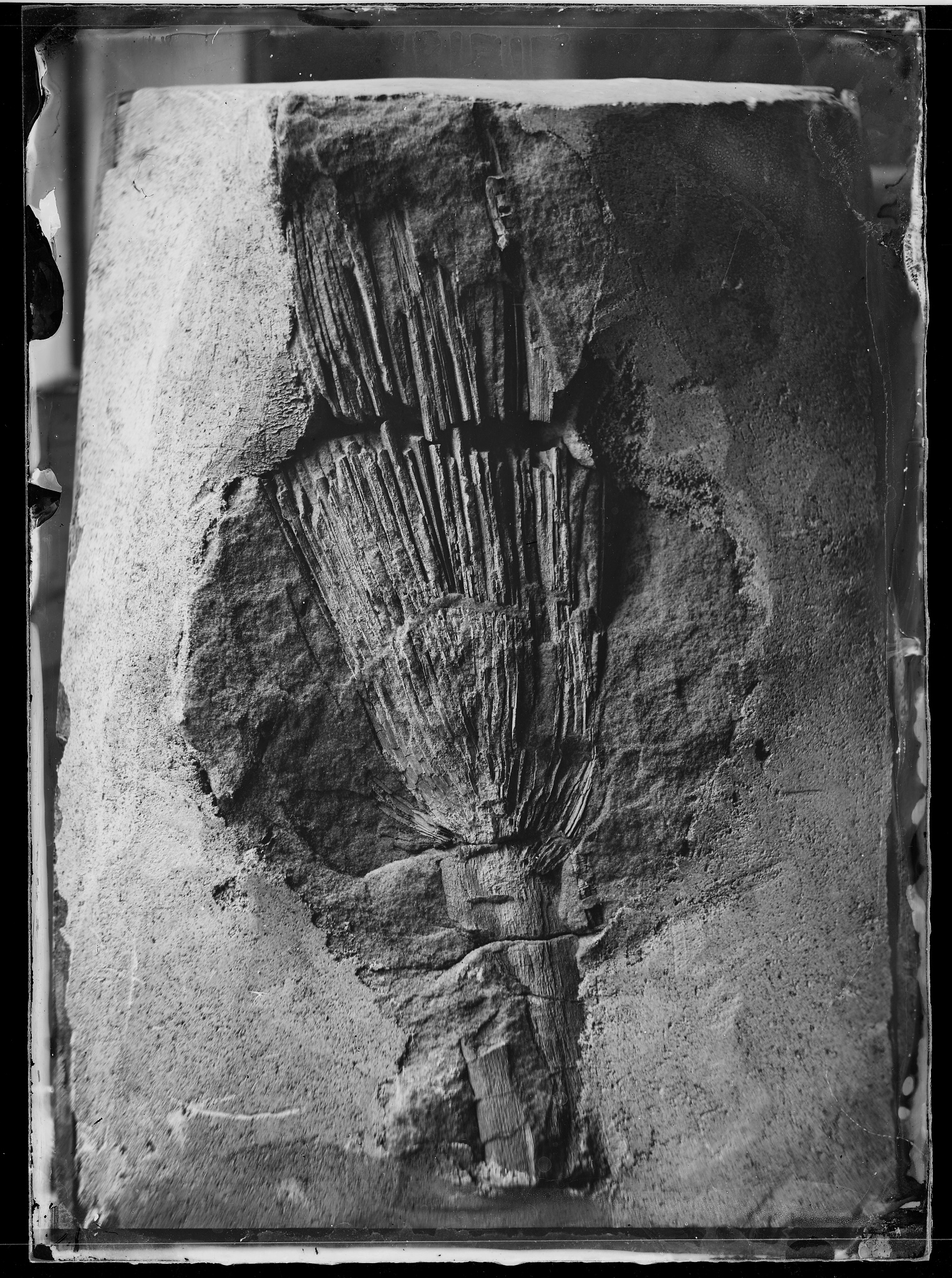 plaque négative au collodion format 13x18cm. inscription manuscrite par Eugène Trutat sur enveloppe : "Palmier fossile"